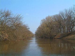 Berettyó folyó